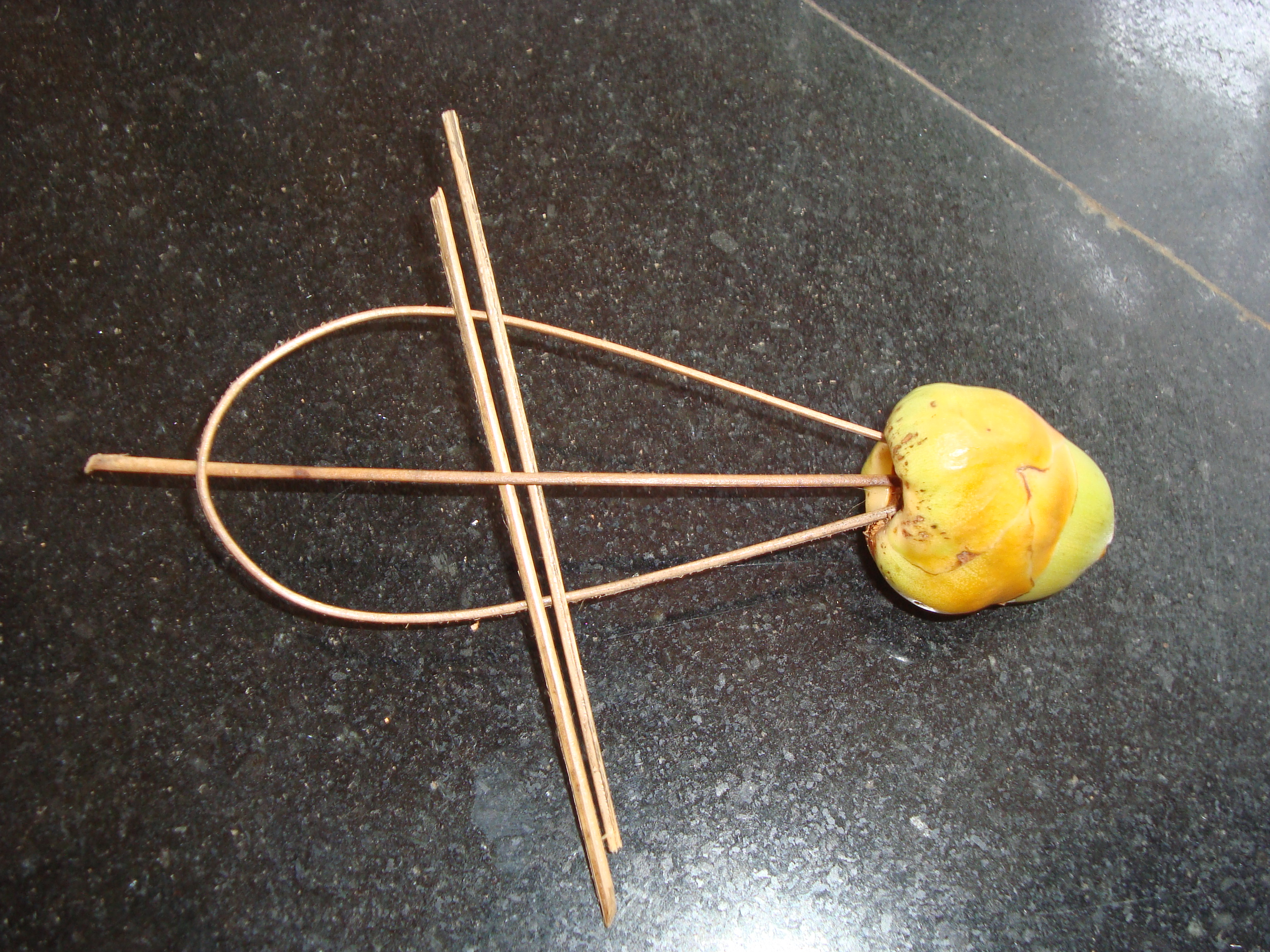 മച്ചിങ്ങ കൊണ്ടുണ്ടാക്കിയ കളിപ്പാട്ടം. കറക്കുമ്പോൾ കടകട ശബ്ദമുണ്ടാകും.